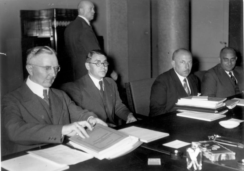 Sitzung der Transferkommission in der Reichsbank. v. l. n. r.: Reichsbankpräsident Schacht, Herr Blessing, Herr Puhl, Herr v. Wedel (Vetreter Deutschlands) 1934